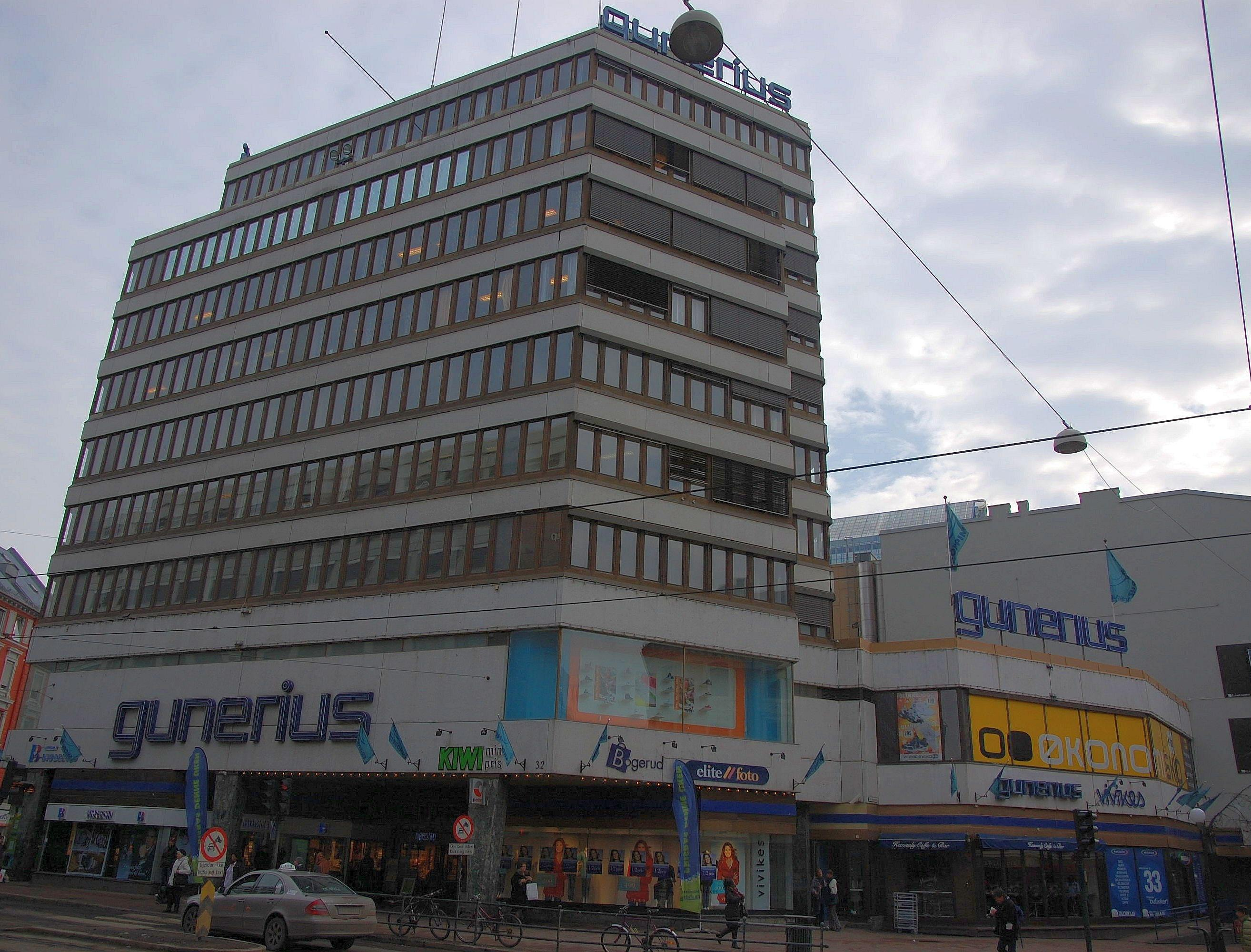 Gunerius i Storgata i Oslo.